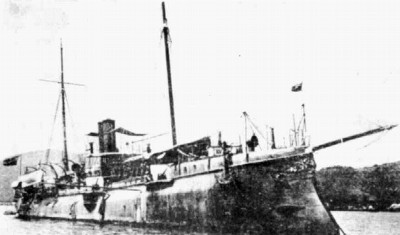 Cañonero Bolívar. También designado como caza torpedero, presto servicios en la Armada Venezolana desde 1900 hasta 1910